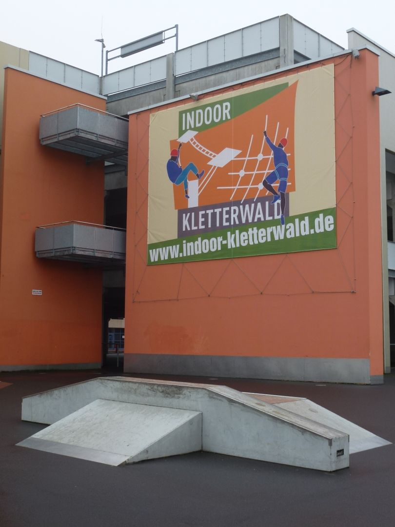 Skatepark und Werbung für den Kletterwald im Nova Eventis